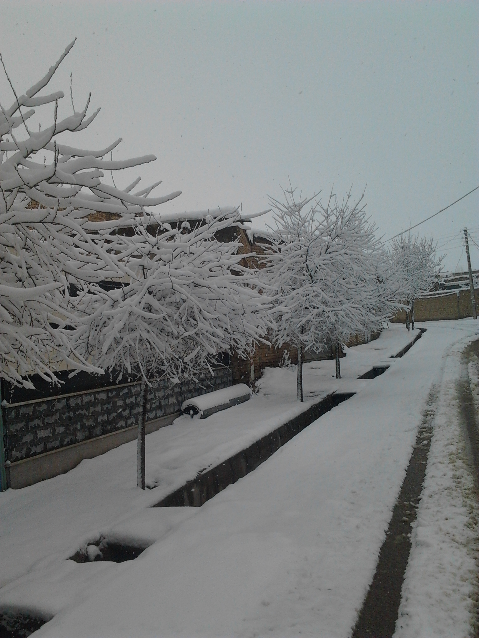 تاریخ : 2014-03-13